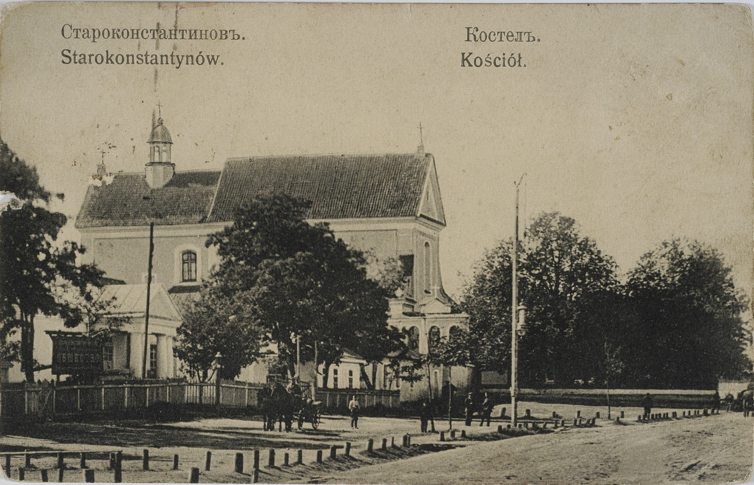 Костел святого Івана Хрестителя та монастир ордену отців капуцинів у місті Старокостянтинові.